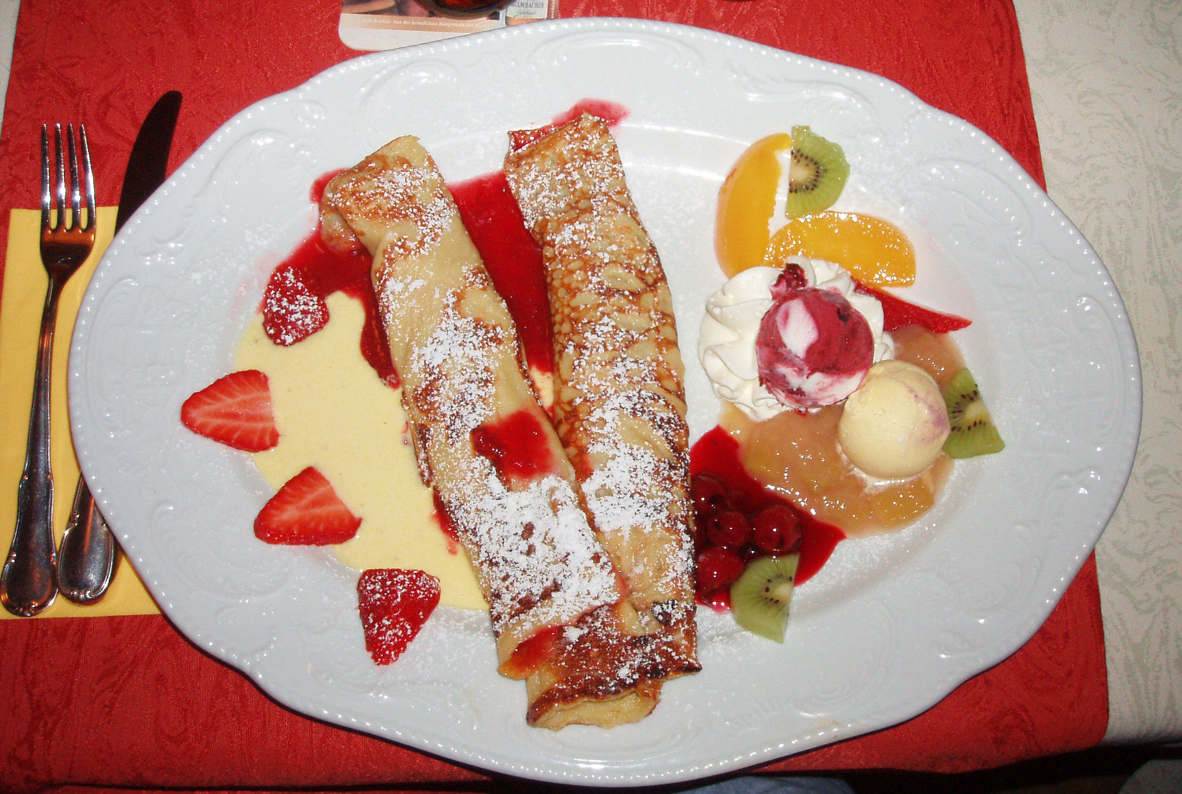 Palatschinken